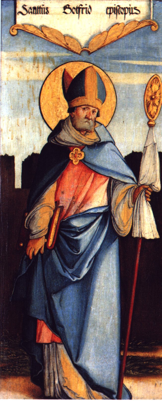 Ausstattung der ehemaligen Seitenaltäre der Meßkircher St. Martinskirche, Standflügel: Heiliger Gottfried von Amiens als Bischof Eingescannt aus: Anna Moraht-Fromm und Hans Westhoff: Der Meister von Meßkirch – Forschungen zur südwestdeutschen Malerei des 16. Jahrhunderts, Ulm, 1997, S. 172 rechts